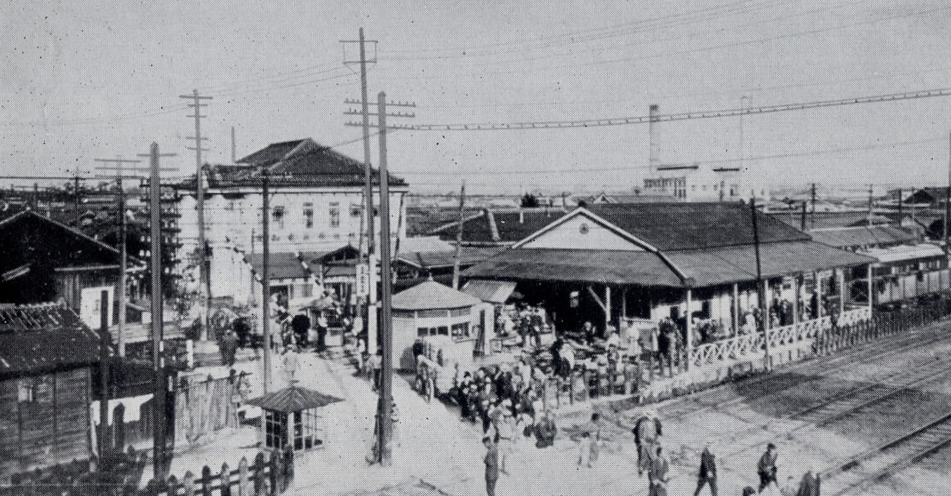 大正中期の神宮前駅